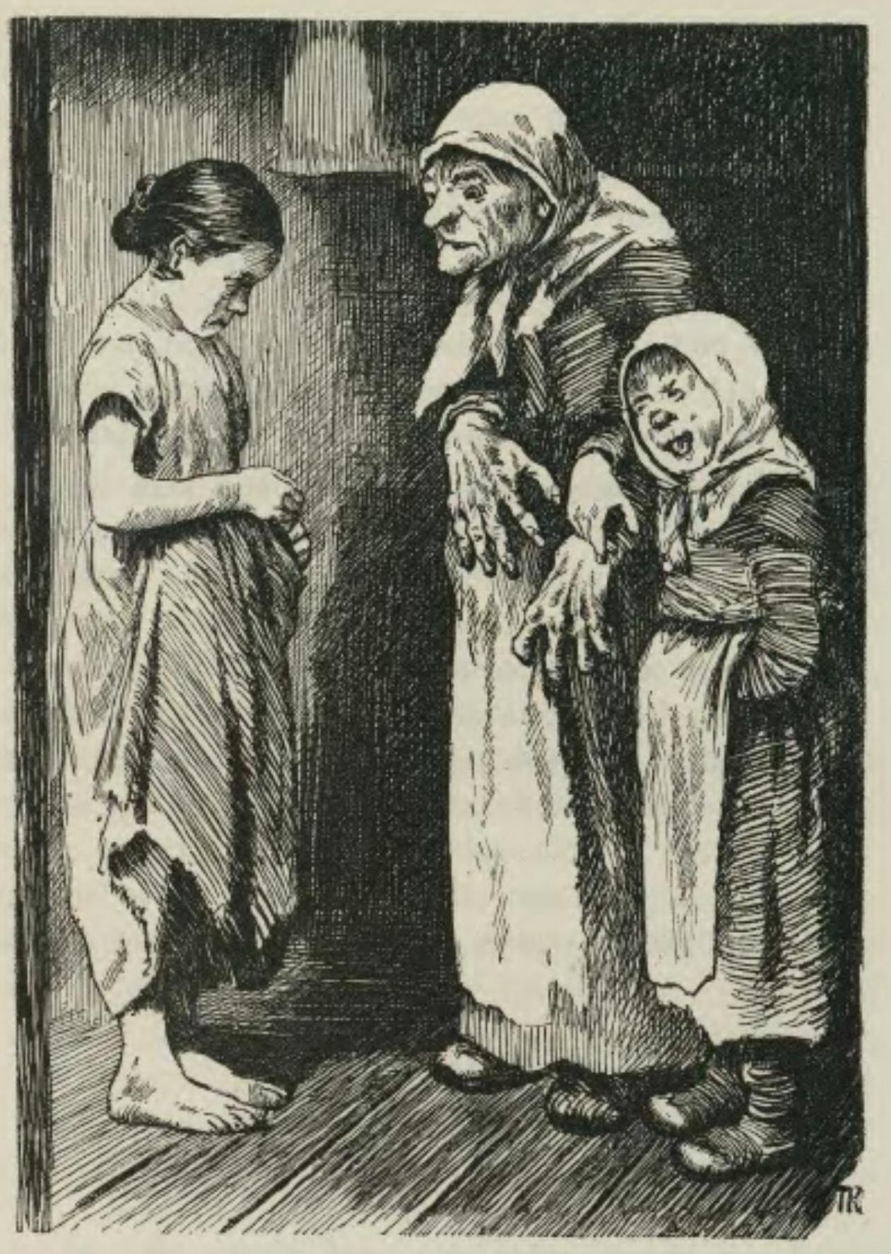 Sagobok för barn